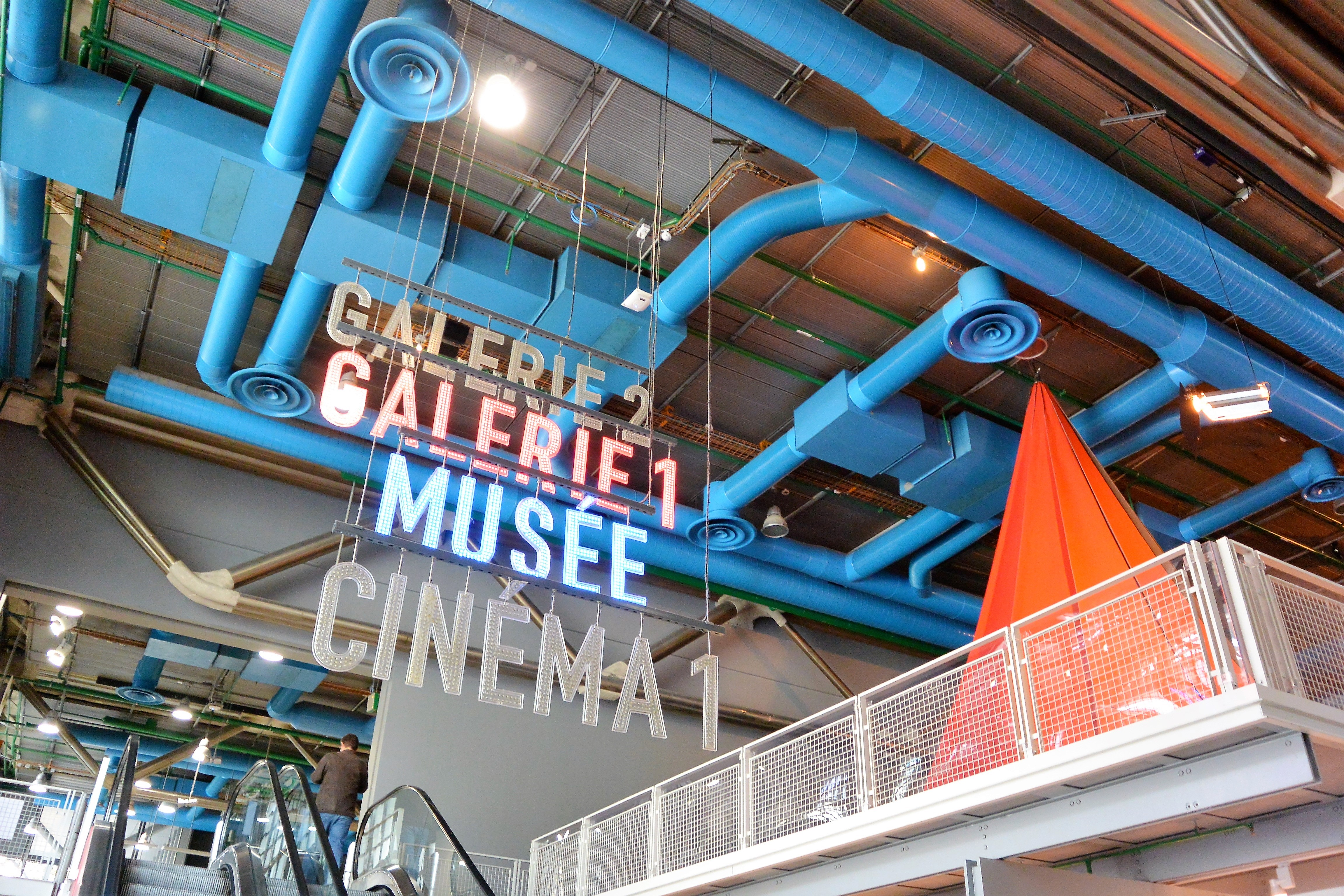 Le Centre national d’art et de culture Georges-Pompidou, communément appelé Centre Pompidou ou plus simplement Beaubourg. Paris. Vue de l'intérieur. 2014